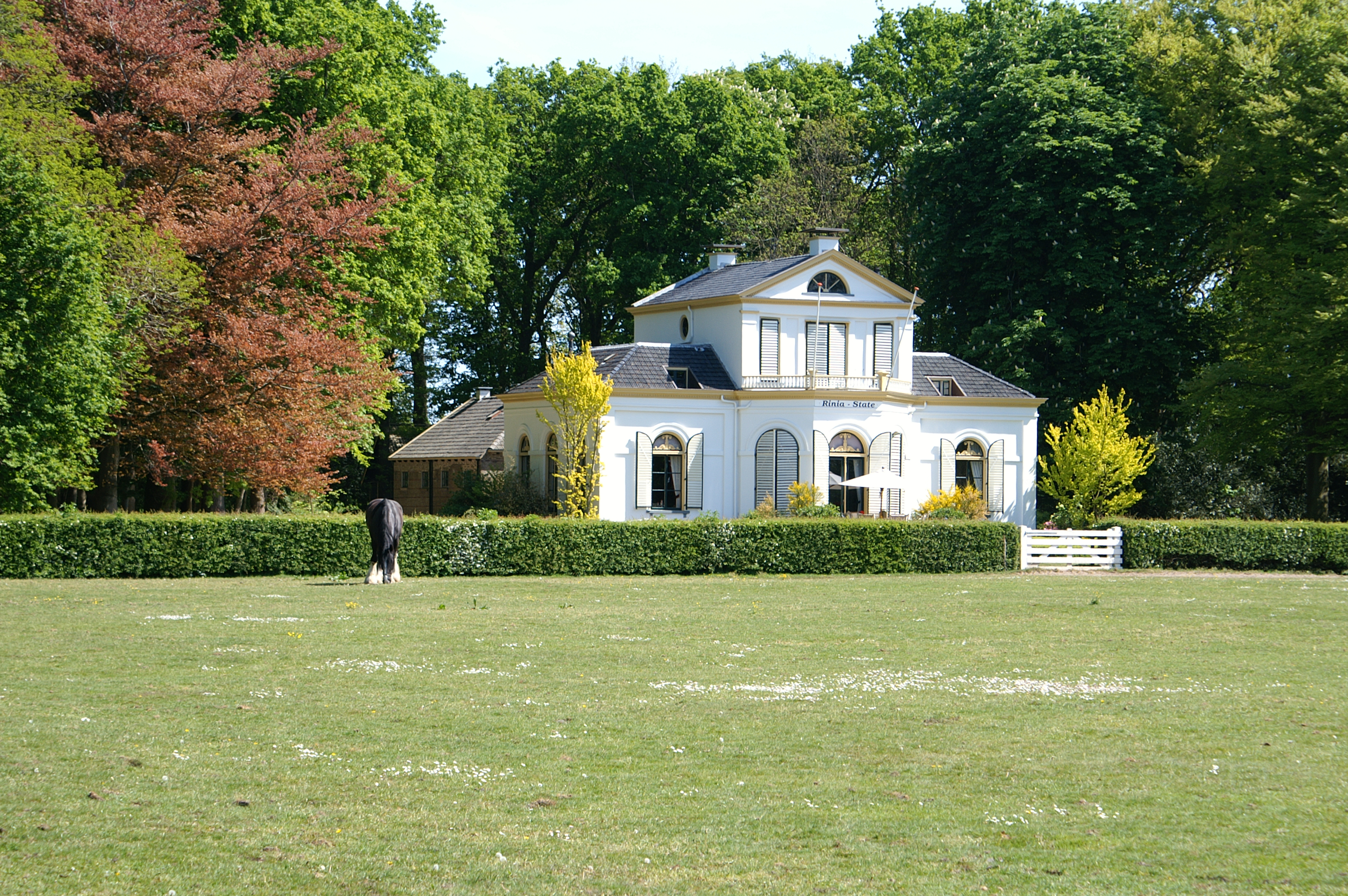 Rinia-State te Oudemirdum.